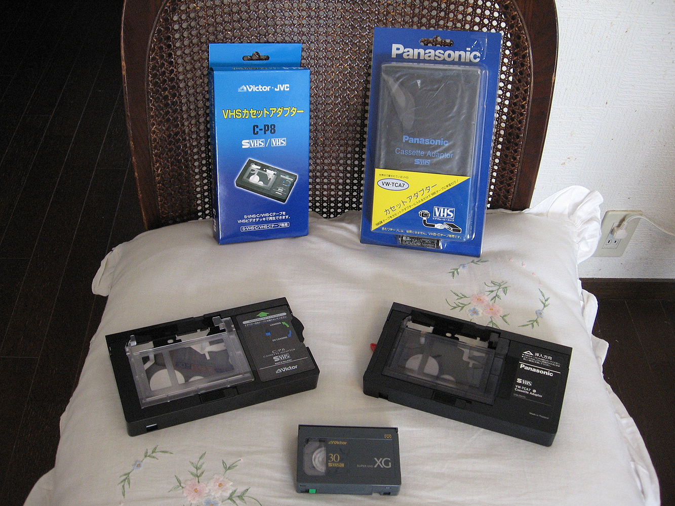 投稿者自身が手持ちのS-VHS-Cカセットアダプターを撮影。 写真は、いずれも2007年（平成9年）10月現在において、発売中の製品です。 C-P8 日本ビクター製（左） VW-TCA7 松下電器産業製（右）